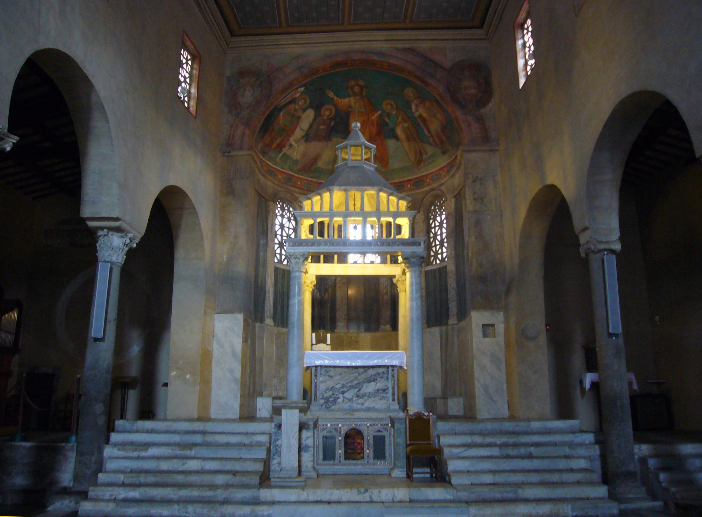 Roma, san Giorgio al Velabro: il baldacchino